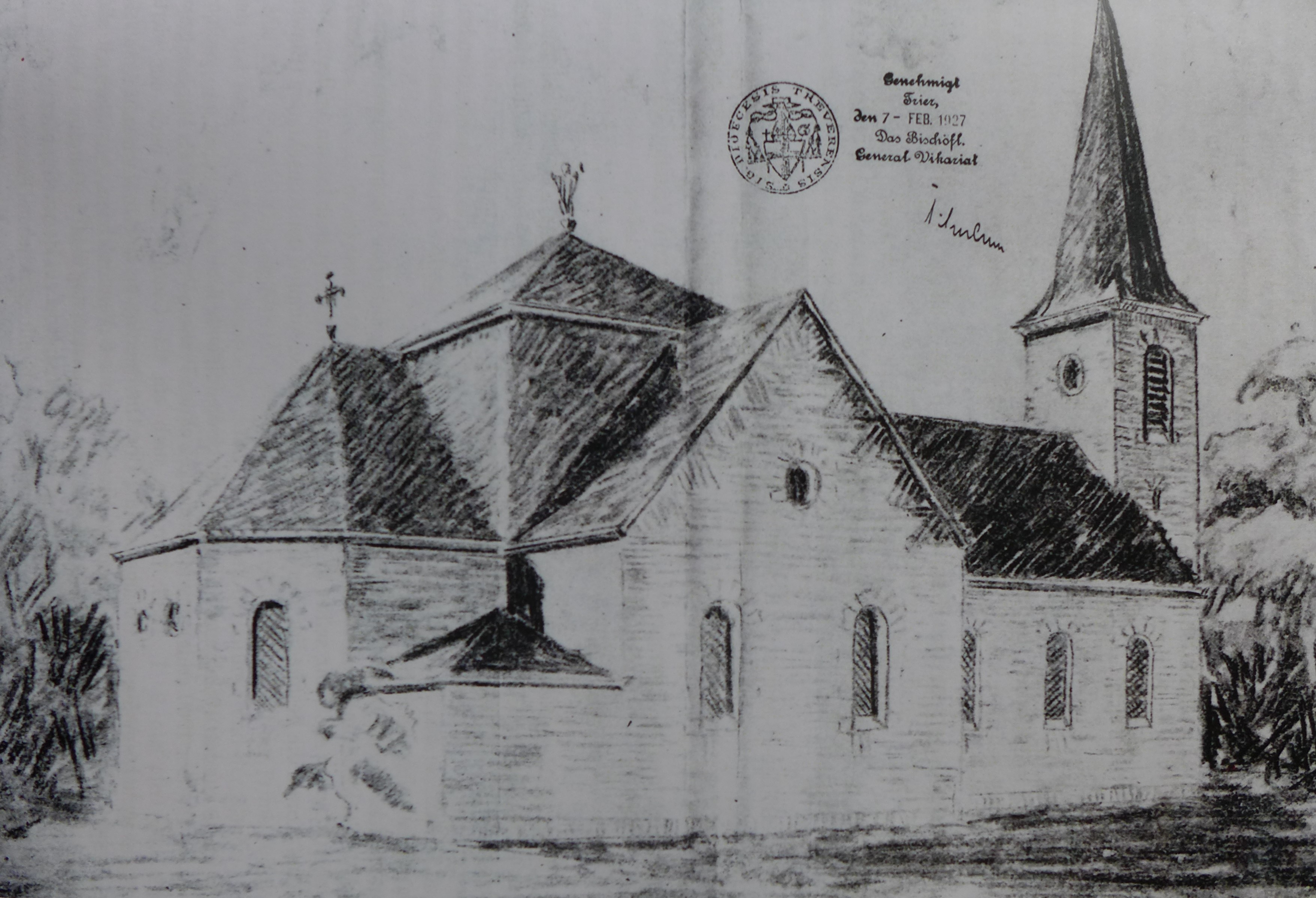 St. Peter und Paul (Nalbach), Entwurfszeichnung für den Umbau der Kirche durch Becker und Falkowski (Pfarrarchiv Nalbach)